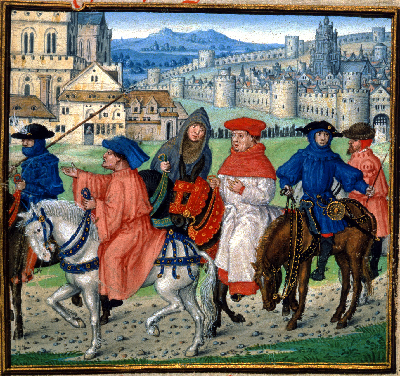 Кентерберийские паломники. Миниатюра из "Осады Фив" Джона Лидгейта (Royal 18 D II f.148), 1455—62 гг.